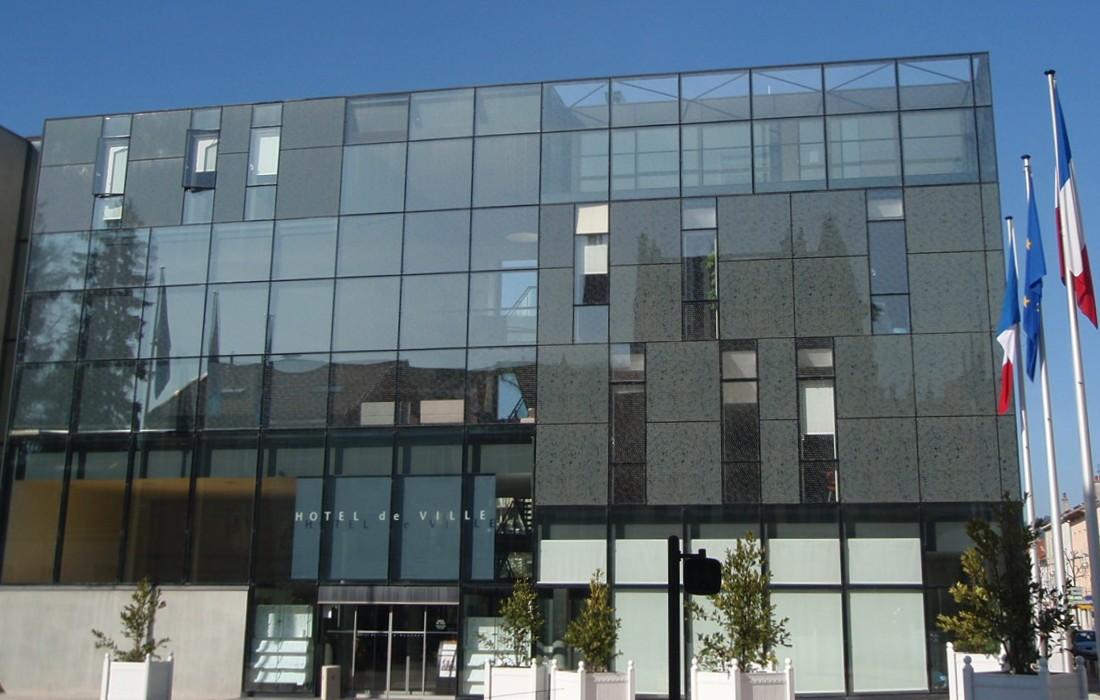 Hotel de ville, Oyonnax